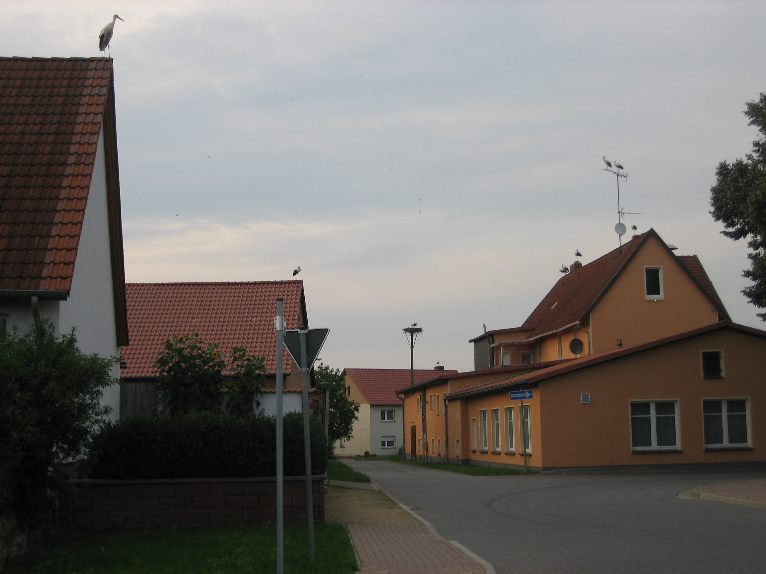 Störche in Henningen